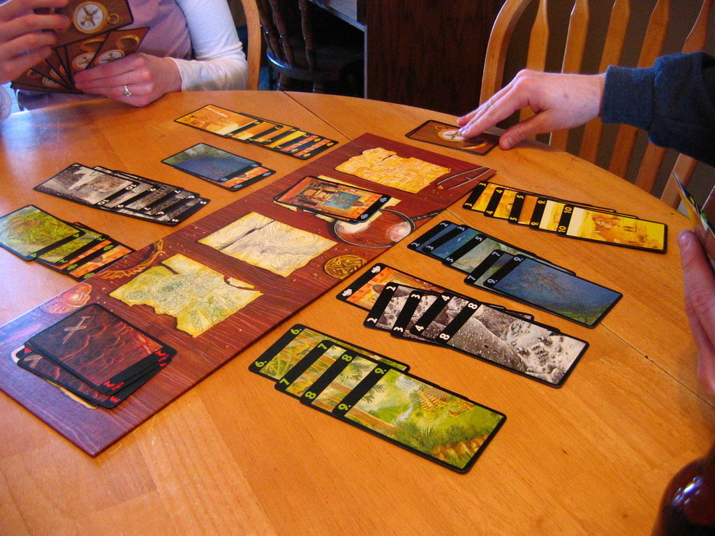 Jeu de société lost cities